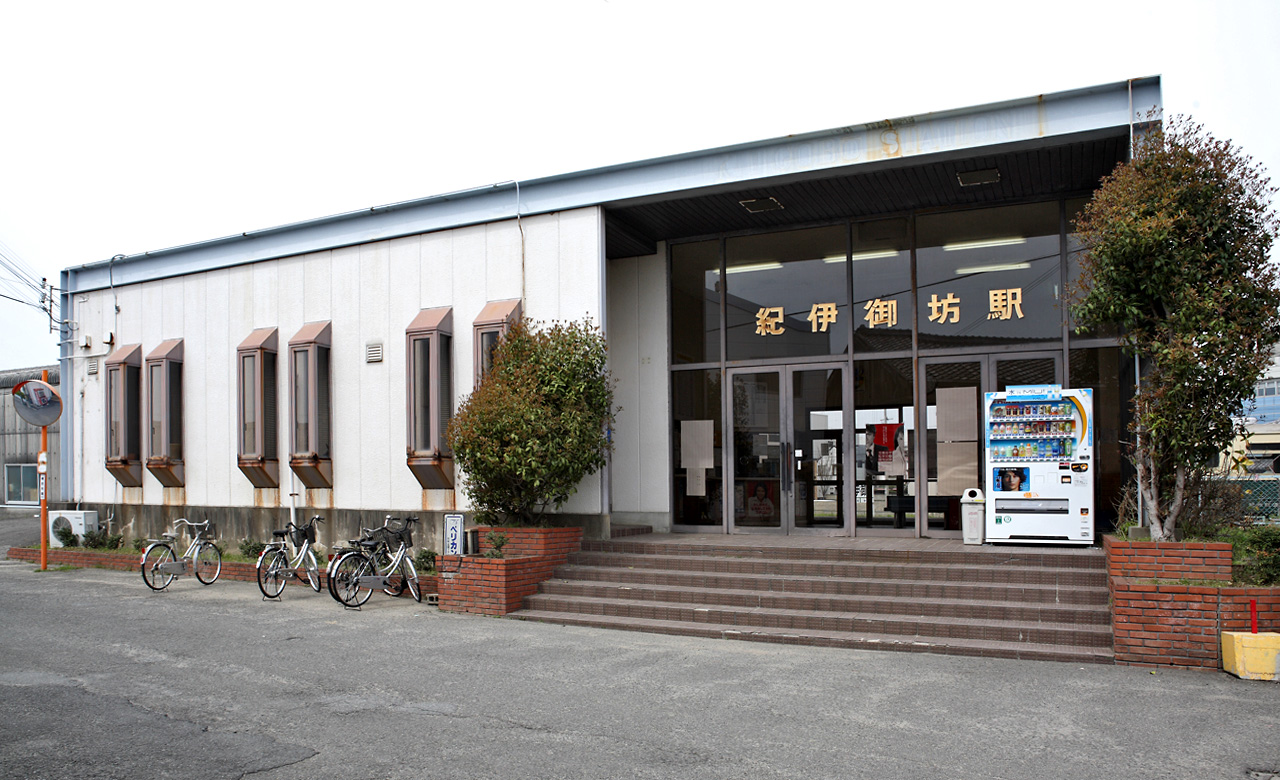 Kishu Railway Kii-Gobō Station